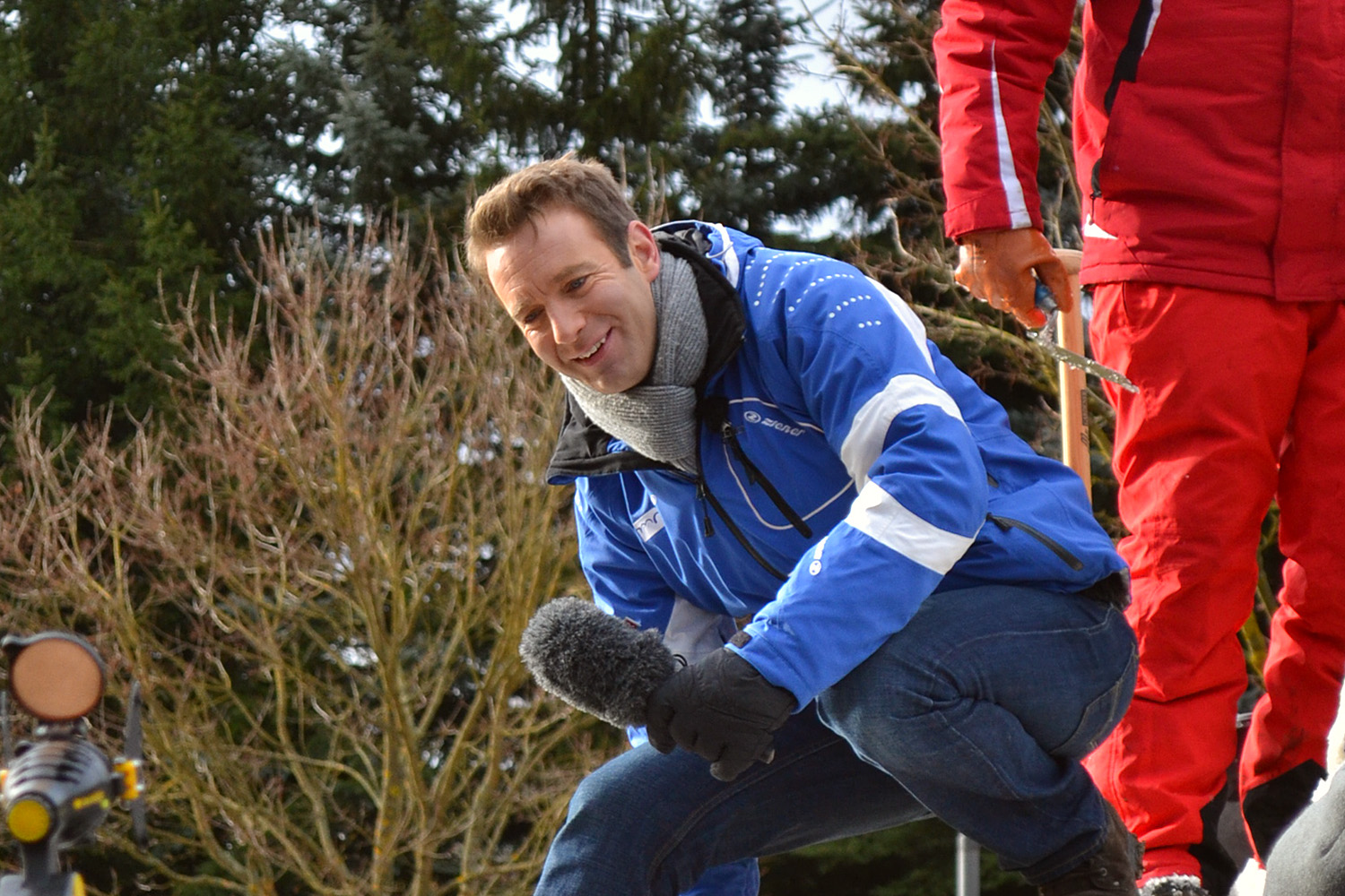 Radiomoderator Peter Imhof aufgenommen in Hasselfelde anlässlich der Sendereihe "Wintermärchen"